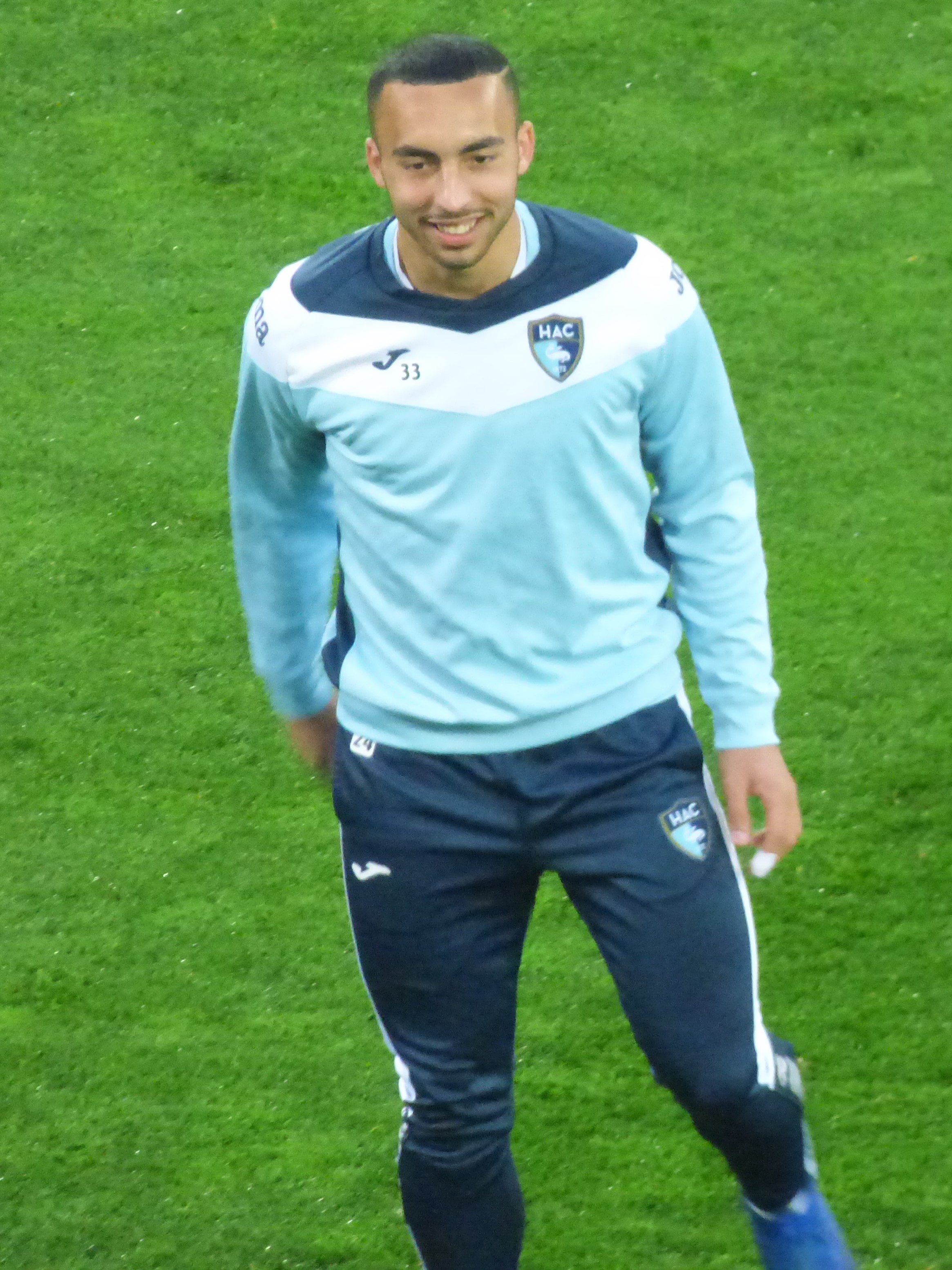 Himad Abdelli avant le match Lens / Le Havre, comptant pour la 30ème journée du championnat de France de Ligue 2 2018-2019, le 1er avril 2019 au Stade Bollaert-Delelis.